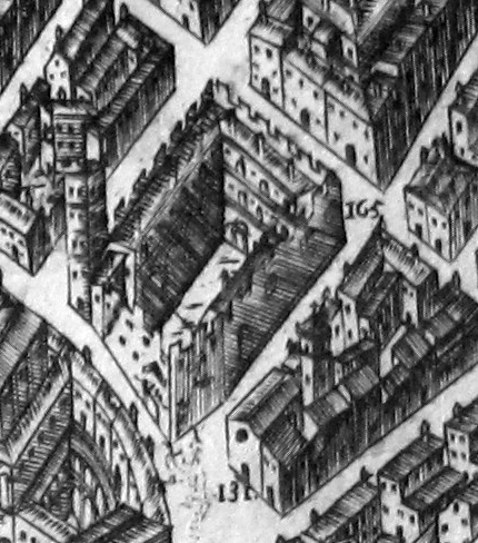 Pianta del buonsignori, dettaglio 165 palazzo del podestà (bargello)